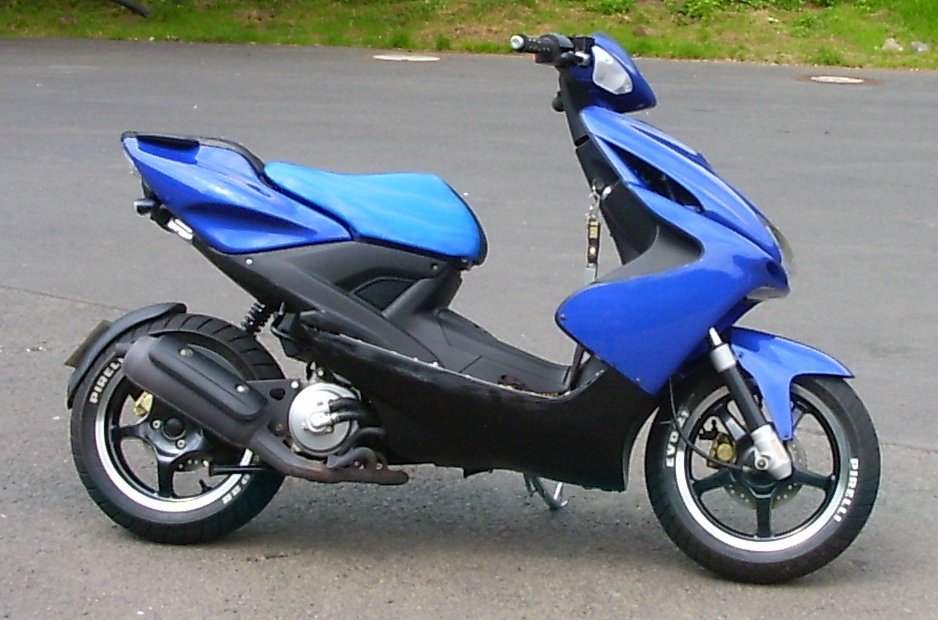 Bildbeschreibung: Motorroller Yamaha Aerox (Baujahr 2004), Aussehen nicht im Werkszustand Fotograf: ion Datum: Juni 2005, Idar-Oberstein